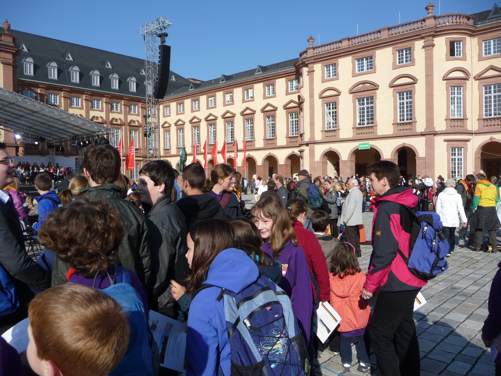 98. Deutscher Katholikentag